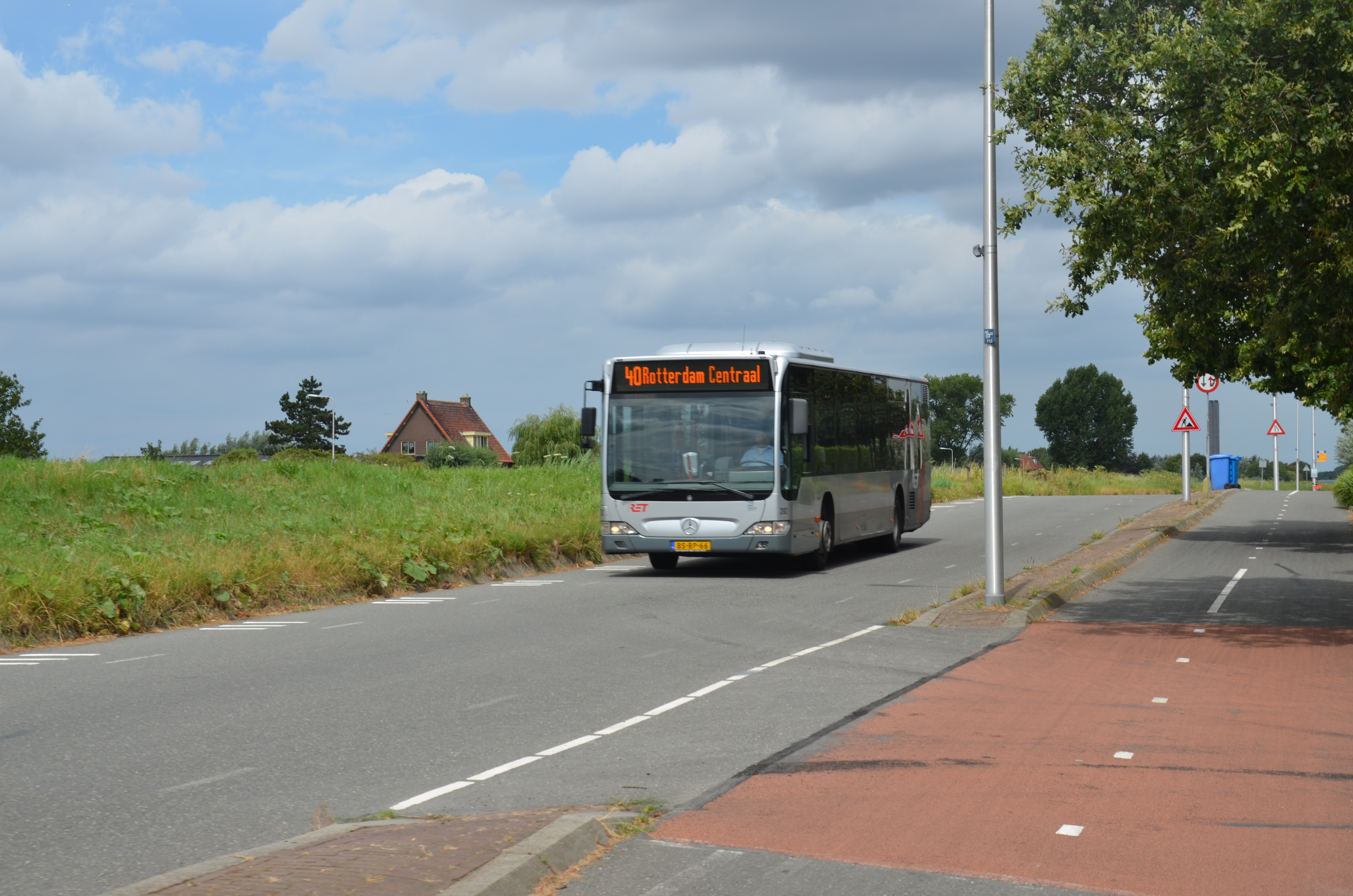 RET bus 40 op de Rotterdamseweg, in de gemeente Midden-Delfland.